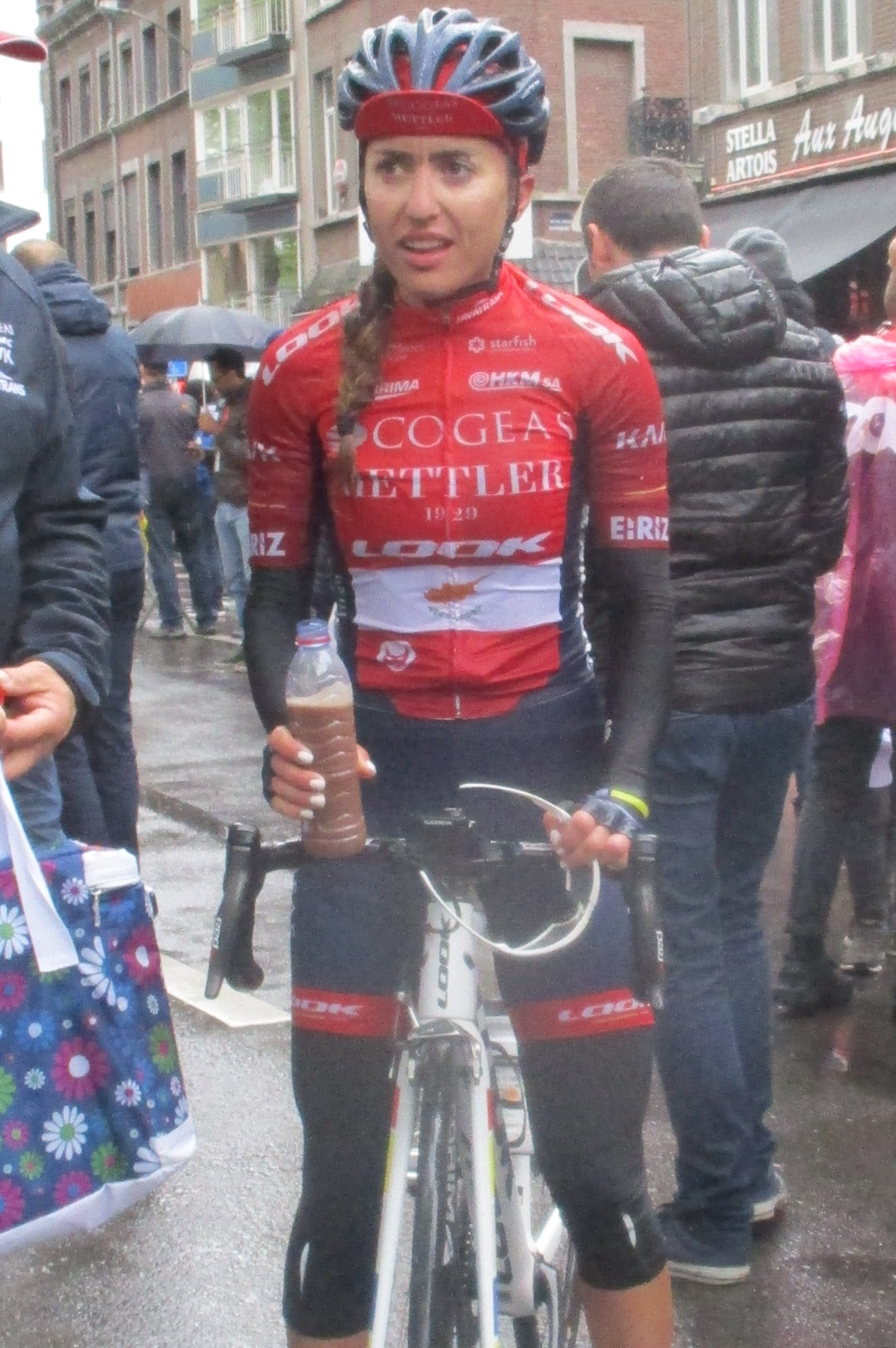 Finish van Luik-Bastenaken-Luik 2019 voor vrouwen op de Boulevard d'Avroy